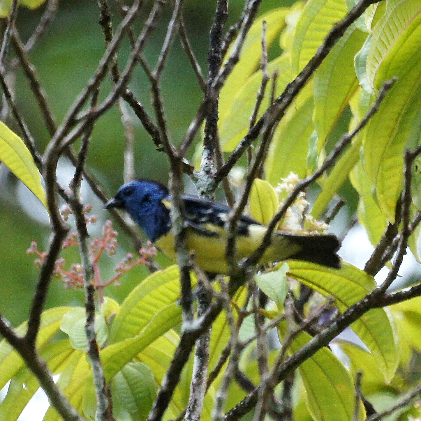 Turquoise Tanager in Trinidad